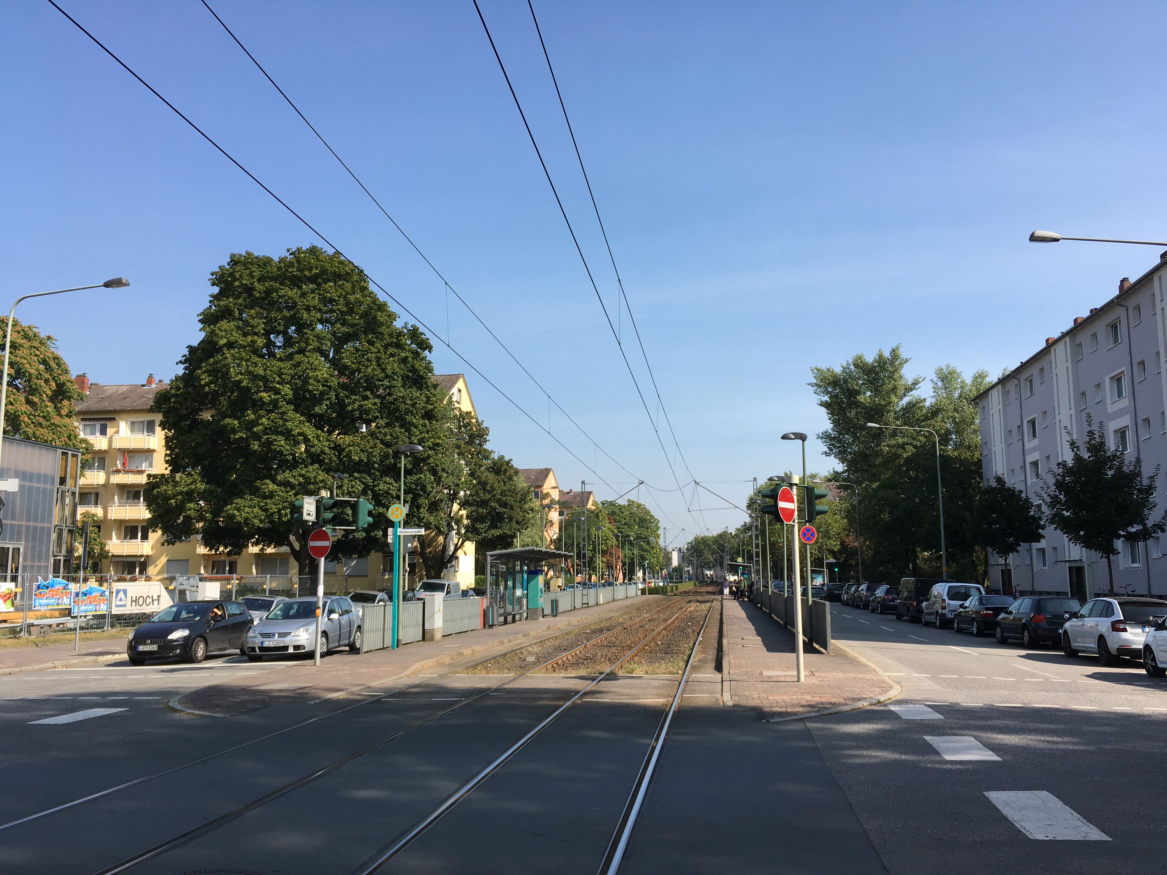 Adolf-Miersch-Siedlung in Frankfurt-Niederrad; erbaut überwiegend in den 1950er Jahren; nach dem Baustadtrat Adolf Miersch benannt; Adolf-Miersch-Straße